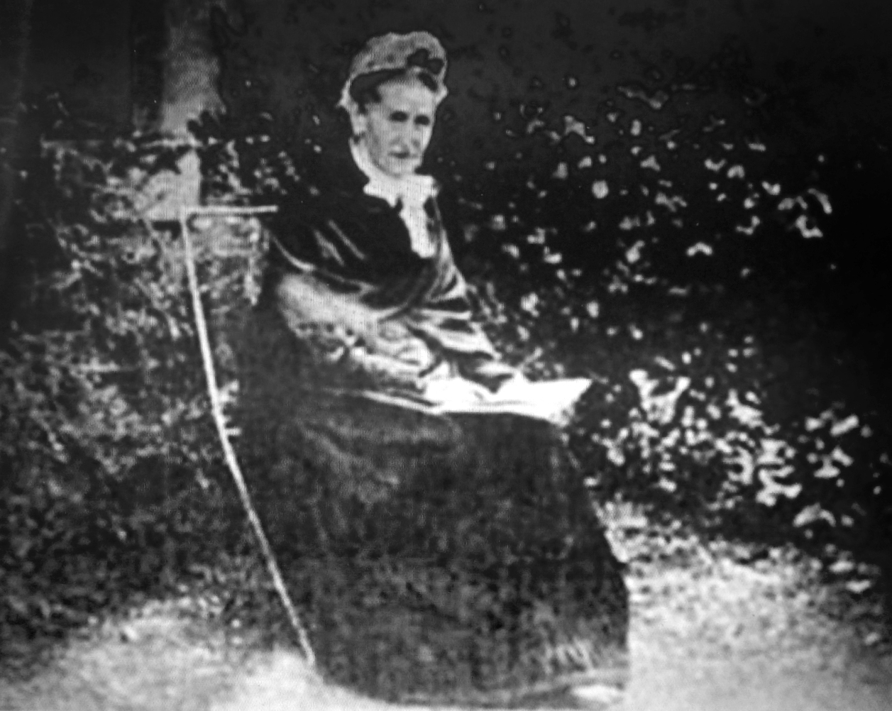 Fotografía de la alquimista y escritora esotérica británica Mary Anne Atwood (1817-1910). Imagen tomada alrededor de 1890.